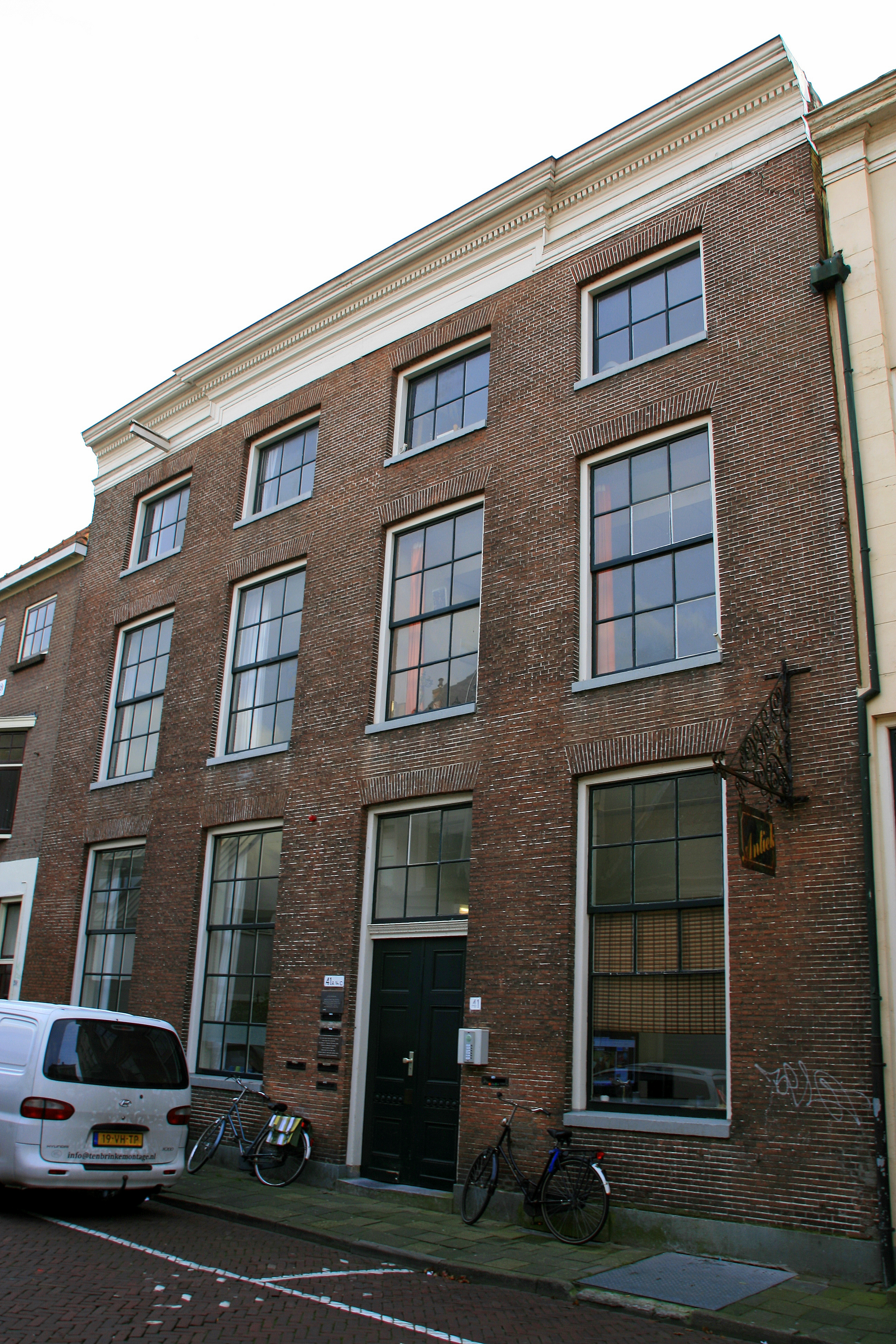 Drukkerij van Zacharias Heyns (1566-1633). Bekend van de Vernieuwde cijfferinge van rentmeester Willem Bartjens. Van 1633 tot 1694 het Zwolse Munthuis. Tijdens de Tweede Wereldoorlog de Joodse School. Deze lagere school was hier gevestigd tussen najaar 1941 en eind 1942. Met ingang van 1 september 1941 waren joodse kinderen en leerkrachten uitgesloten van het algemeen onderwijs. Daarna werd hier een klein joods ziekenhuis ingericht, omdat joden eveneens waren uitgesloten van de algemene gezondheidszorg.